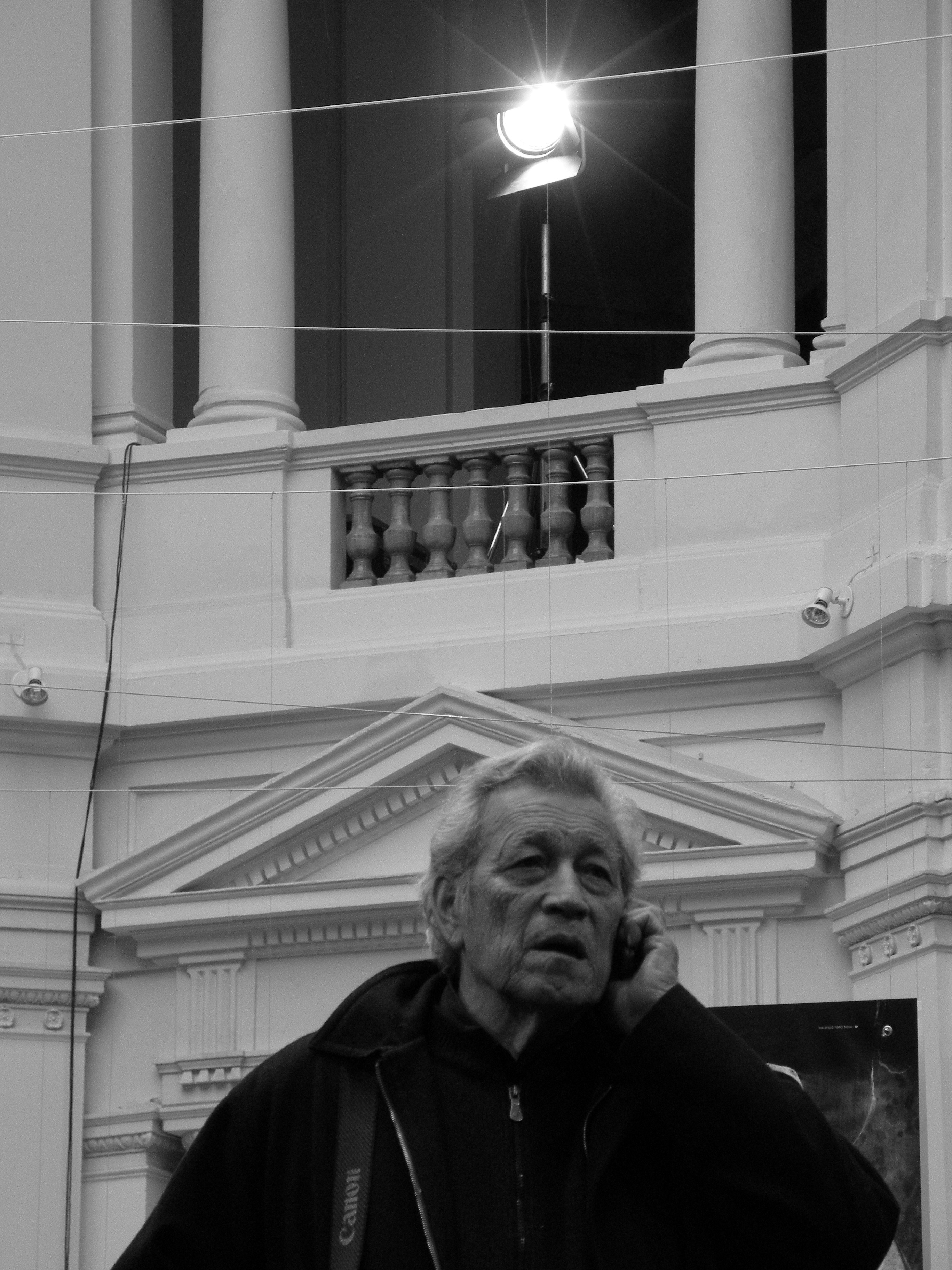 Luis Navarro (1939 - ), fotografo chileno. Durante la dictadura militar chilena (1973-1990) trabajó en la Vicaría de la Solidaridad (revista Solidaridad), fue presidente de la Asociación de Fotografos Independientes (AFI), laboró en medios como Pluma y Pincel, Fortín Mapocho y La Época.